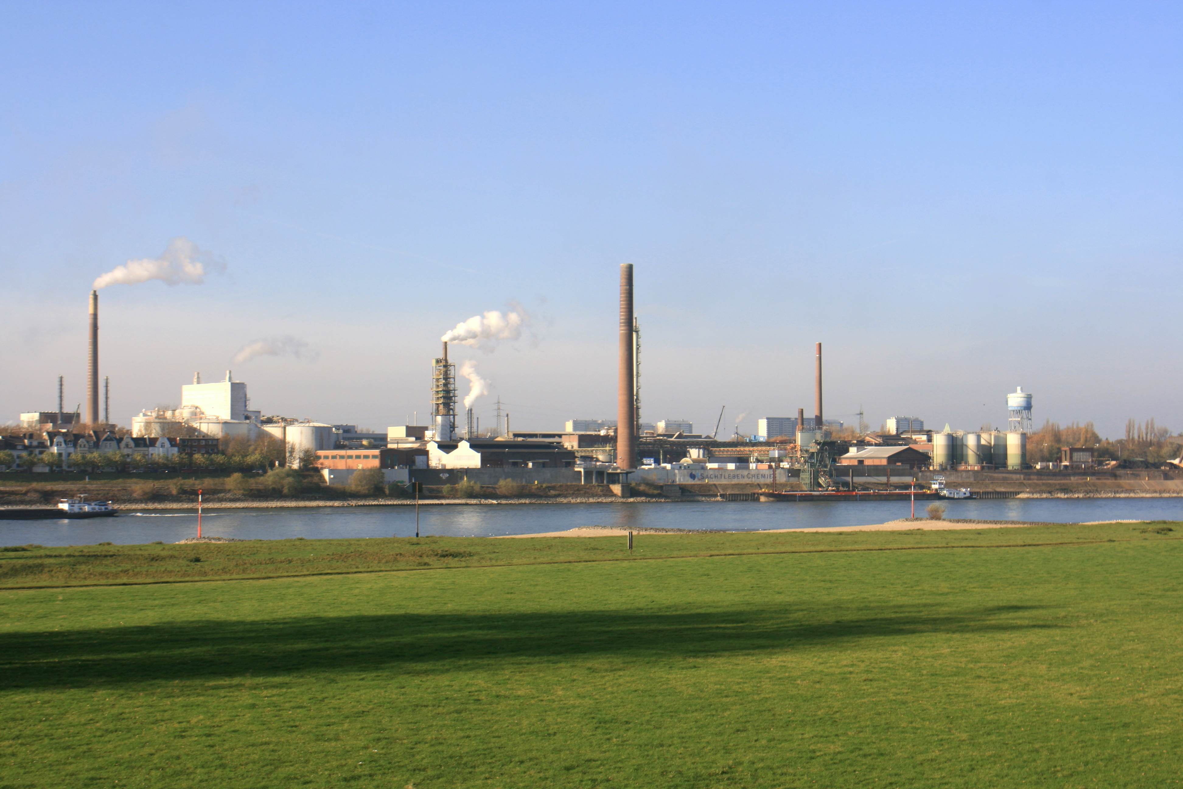 Blick von Am Bört über den Rhein auf die Anlagen der Sachtleben Chemie (an der Wilhemallee/Duisburger Straße) in Duisburg